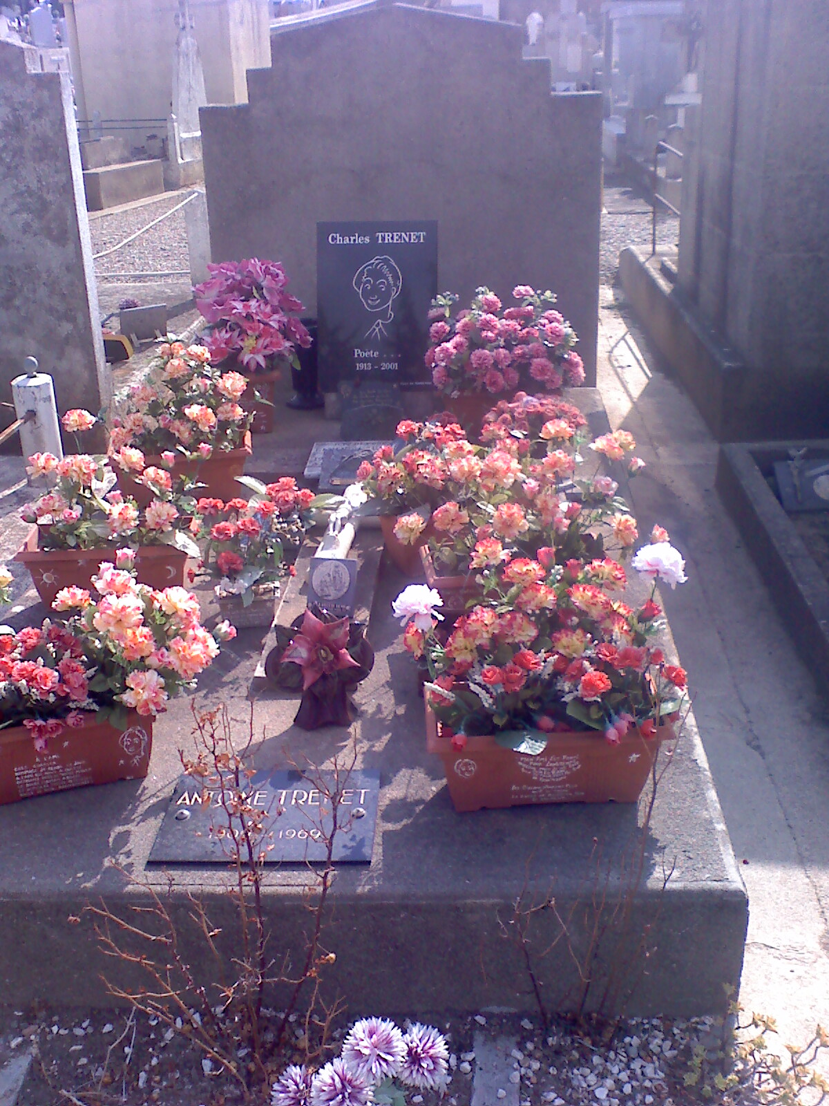 Dans le cimetière de Narbonne, la modeste tombe familliale de Charles Trenet.. pas de granit, ni de marbre, une simple dalle de ciment.. Mais aurait il voulu plus?? Non certainement pas.. Mais que ses notes volent à jamais..